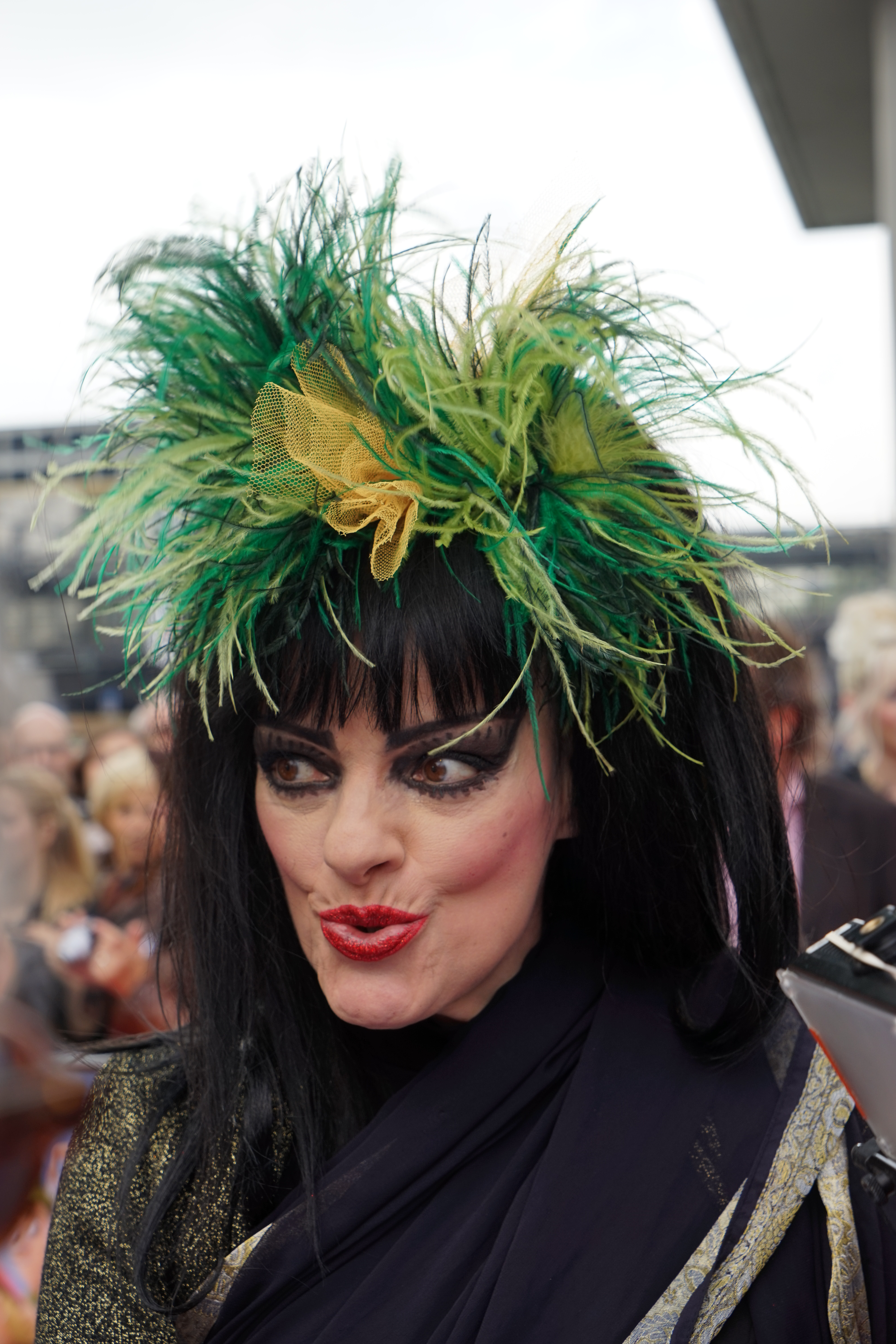 Nina Hagen auf der Premiere des Films "Der Siebte Zwerg" am 21. September 2014